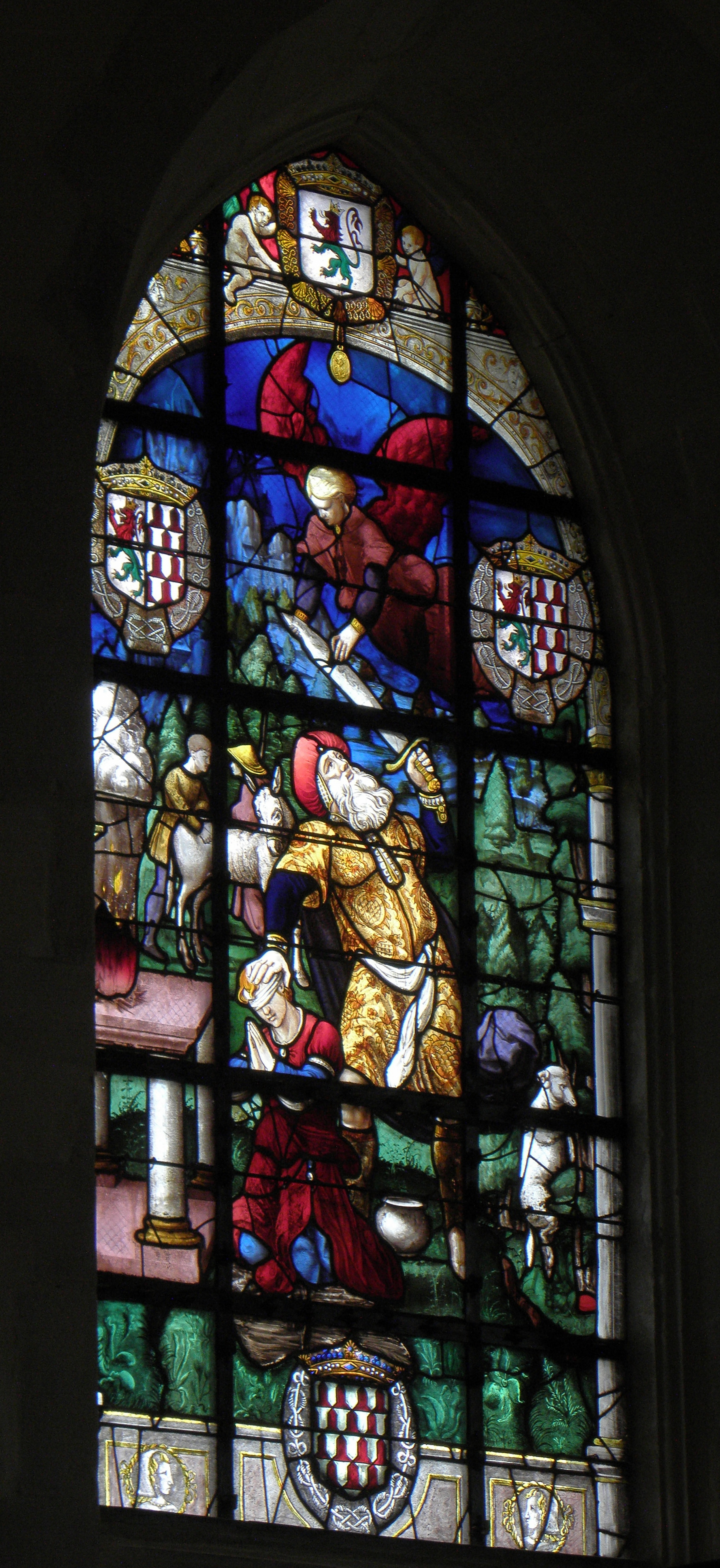 Baie 06 de la collégiale Sainte-Marie-Madeleine de Champeaux (35).